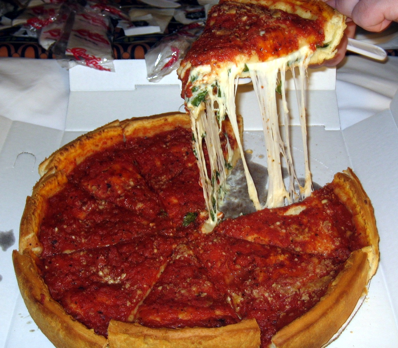 Stuffed spinach Chicago-style pizza at Giordano's